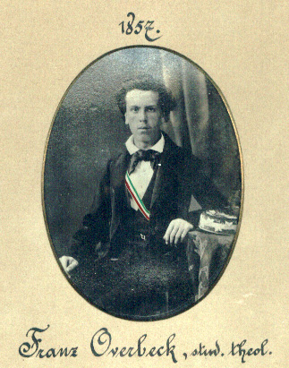 Das Bild zeigt Franz Overbeck während seiner Studienzeit in Göttingen.